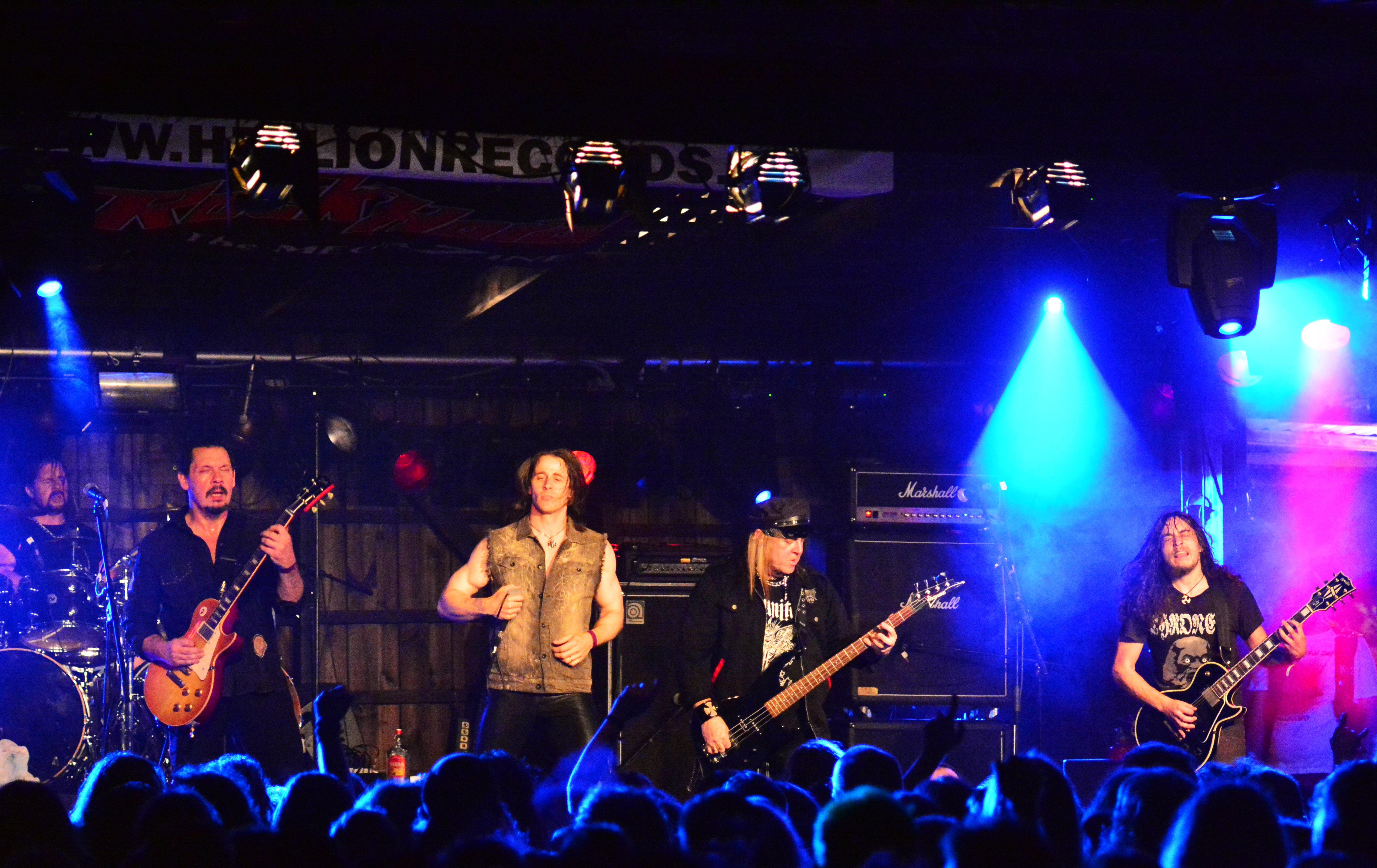 Riot V beim Headbangers Open Air 2014